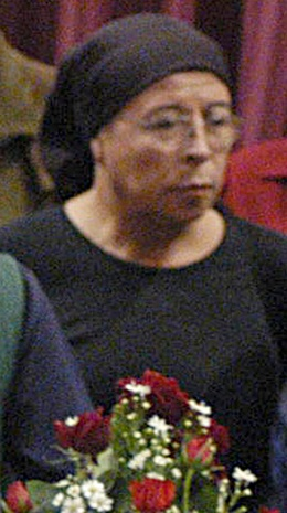 Pedro Lemebel en el velatorio de Gladys Marín, en 2005.